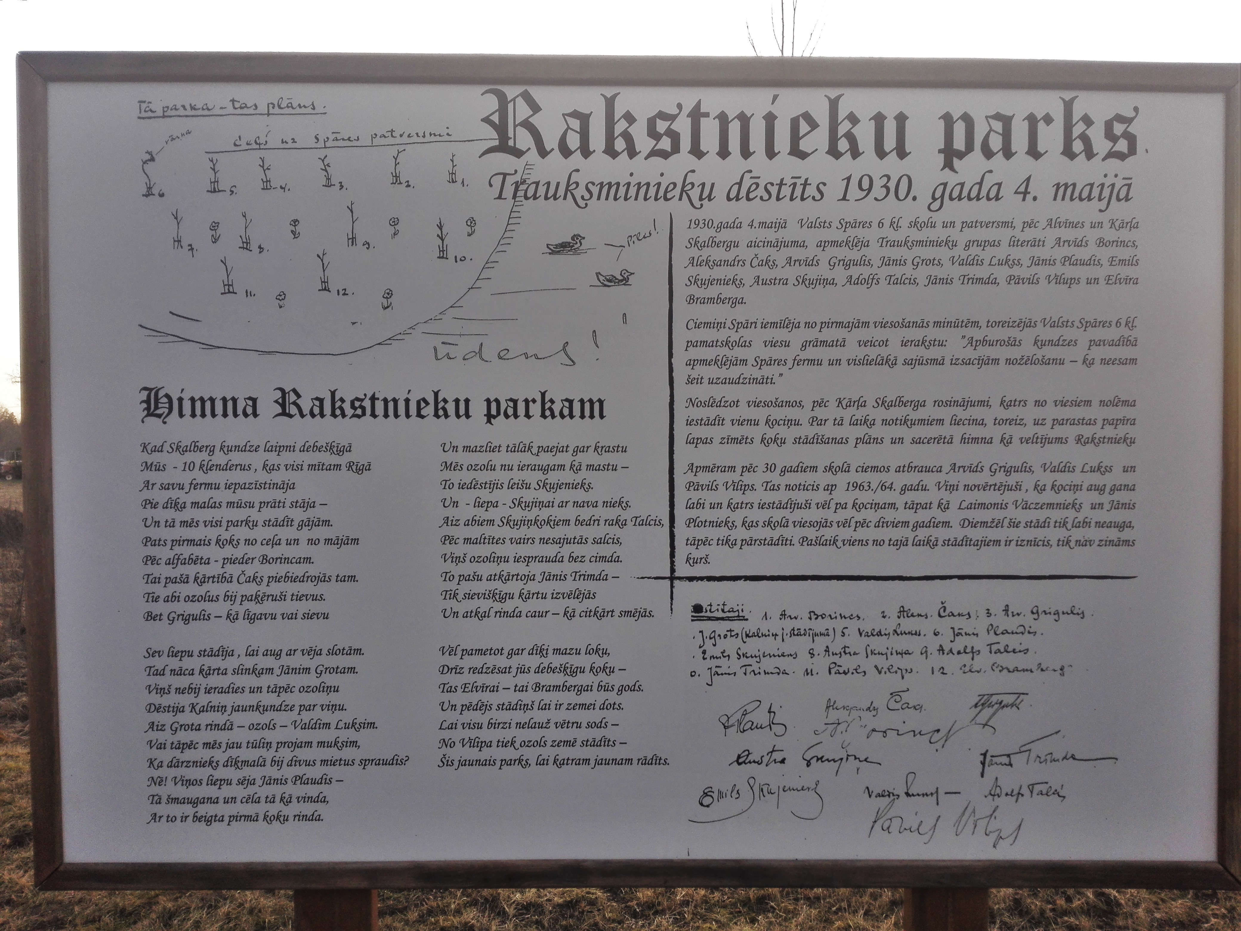 Informācijas stends Rakstnieku parkā